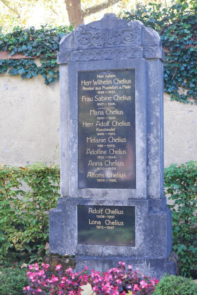 Grab des Malers Adolf Chelius (1856-1923) auf dem Westfriedhof in München